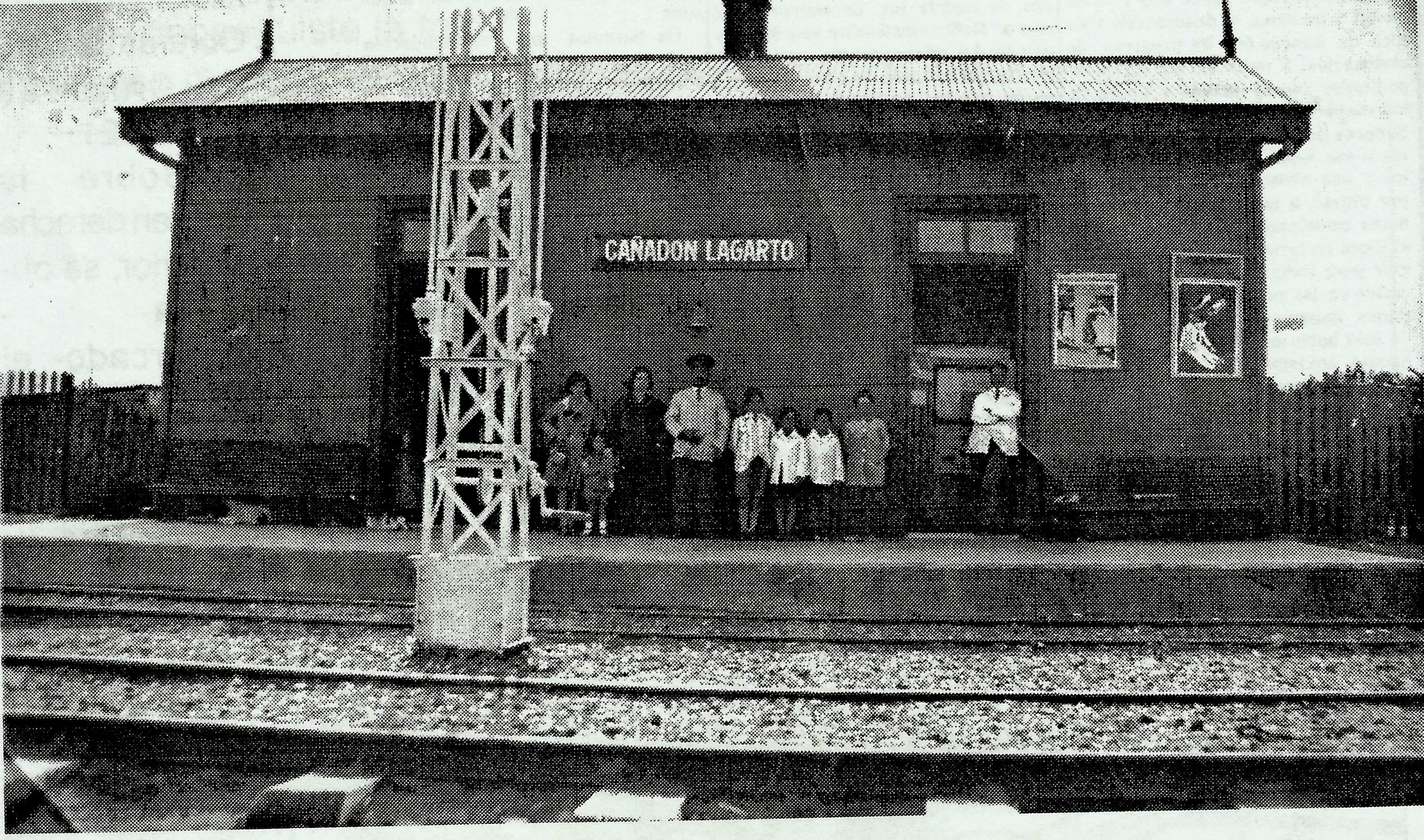 La familia y amigos del guarda de la estación Manuel Fernández